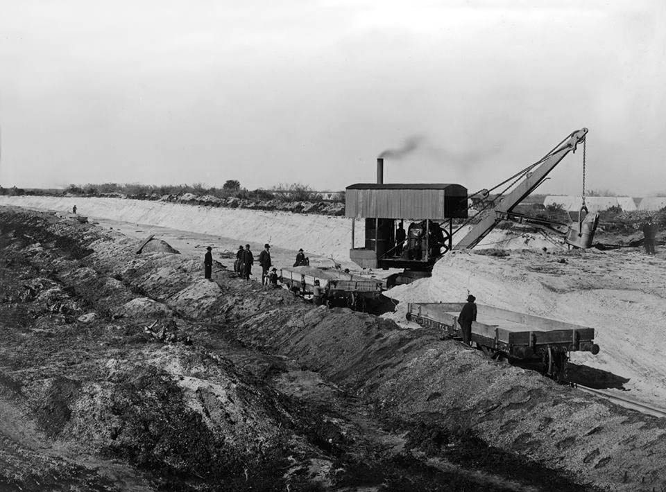 Grúa a vapor cargando conchilla en las canteras de los talas, antiguo ramal del Ferrocarril Puerto-Los Talas